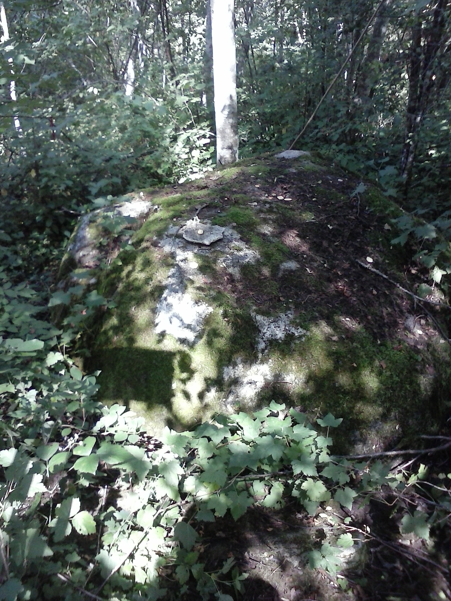 Muistne ohvrikivi Mõisamaa hiies.